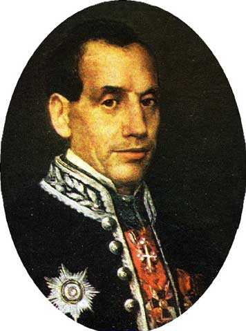 Le Chevalier François Malausséna.